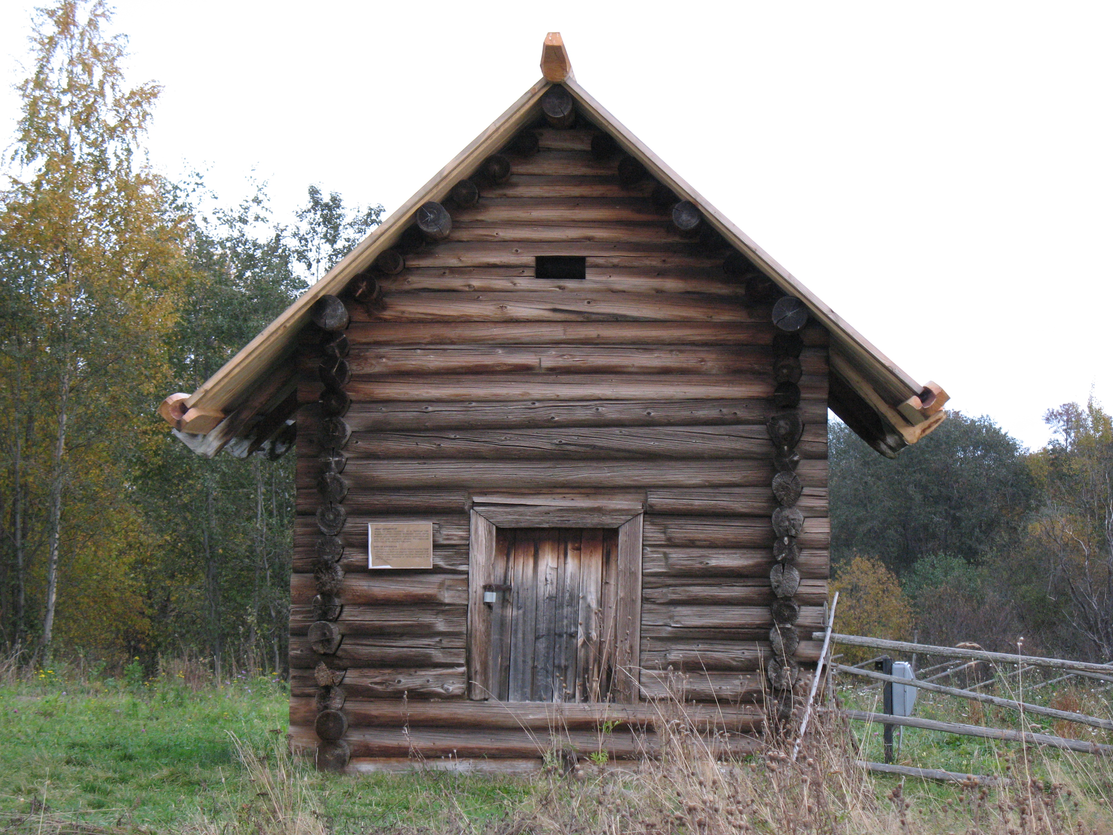 Амбар Абрамовой из д. Великая Нива (Республика Карелия, Петрозаводск, о. Кижи, д. Васильево)